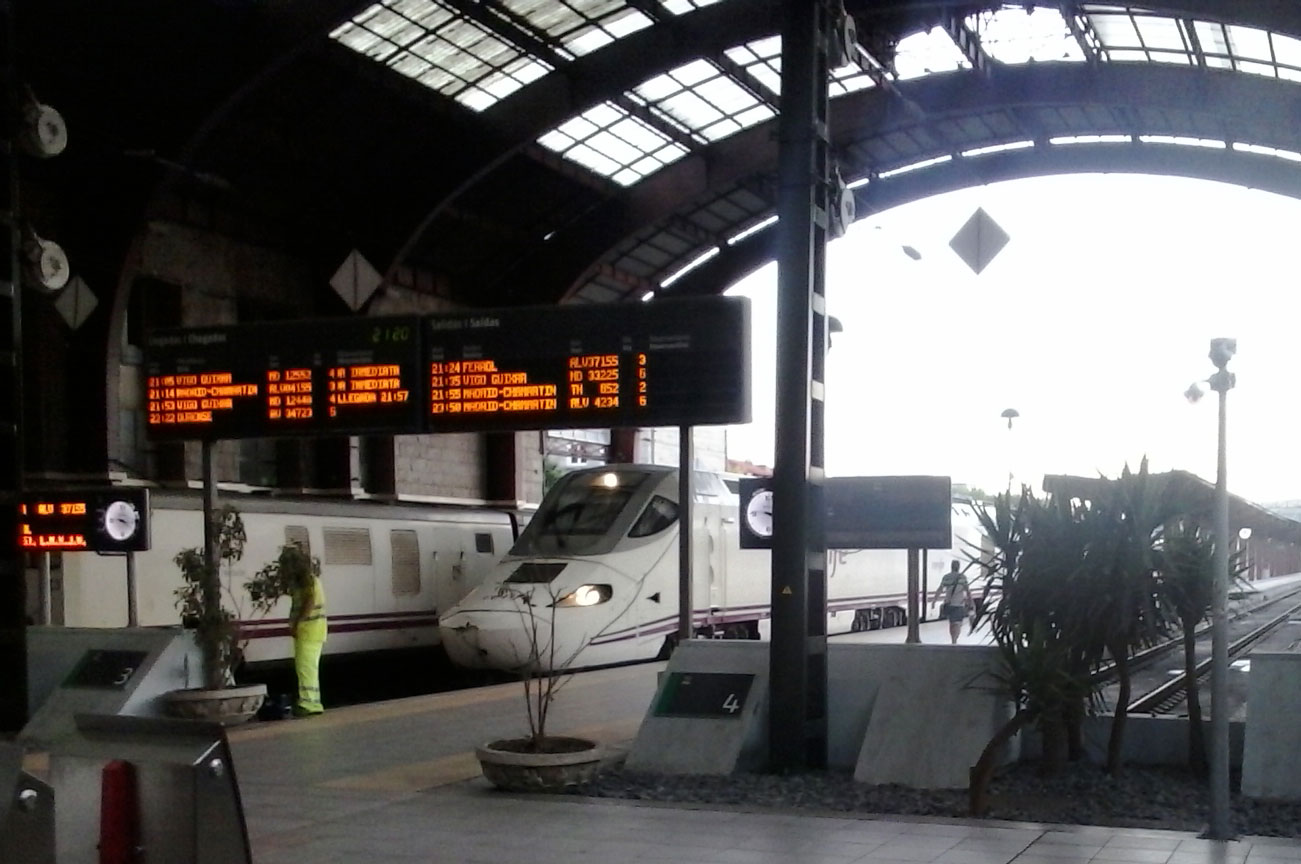 Talgo Alvia Renfe Operadora na estación da Coruña Galiza Spain